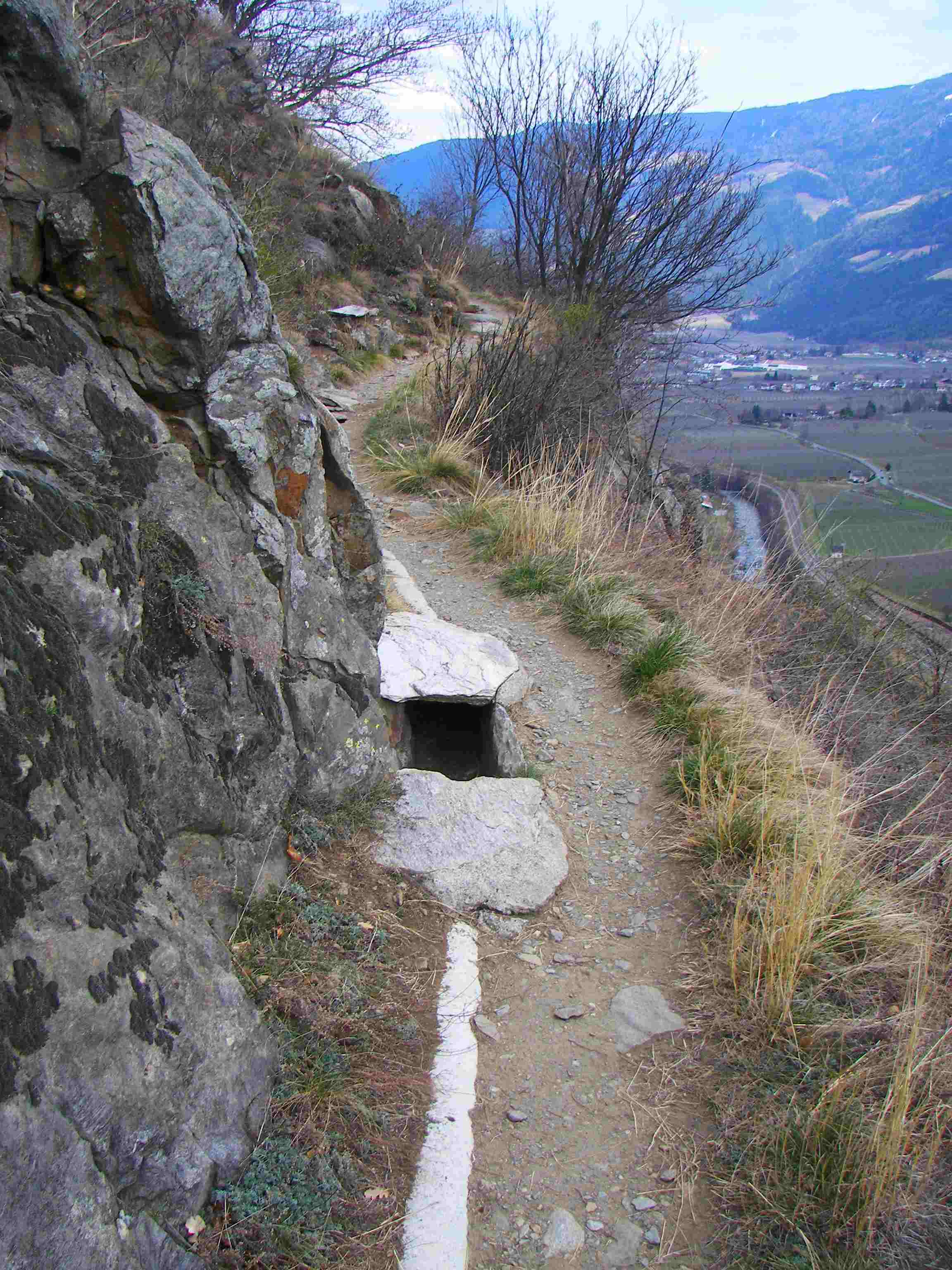 Wanderweg am Stabener Waal